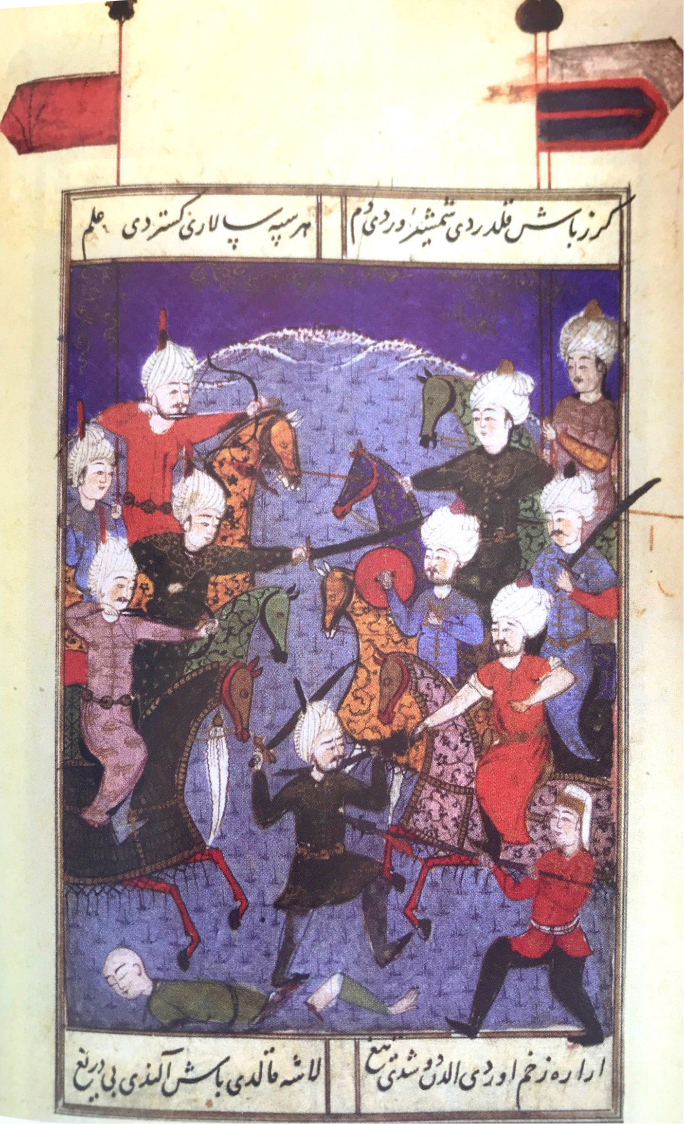 Koçhisar Muharebesi'nin Selimname'de yer alan minyatürü